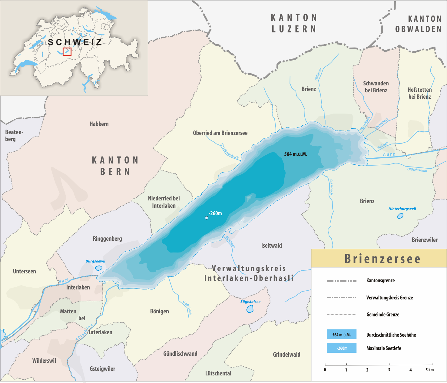 Brienzersee